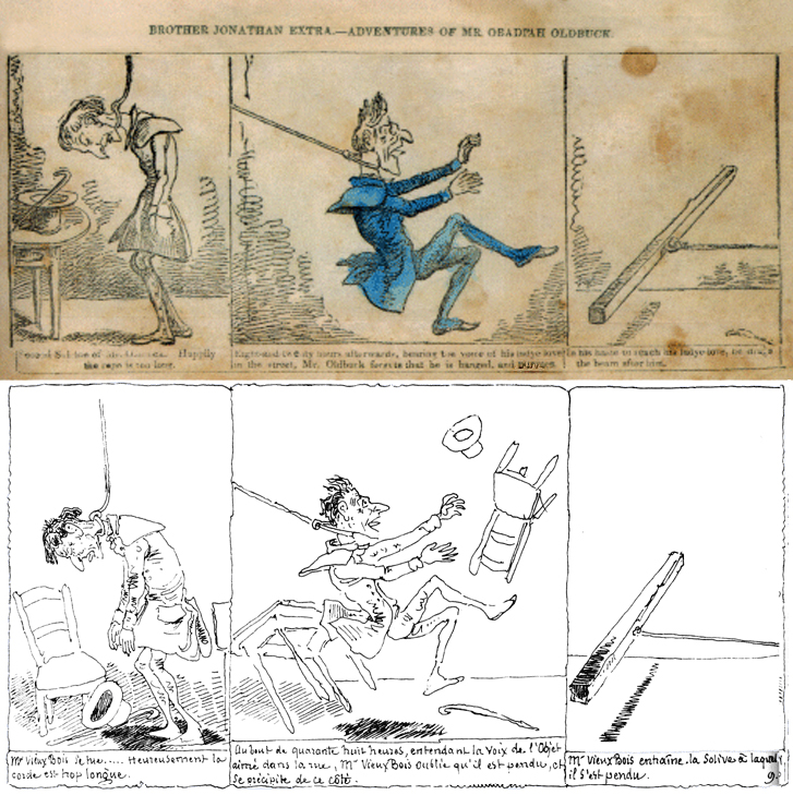 Comparaison avec la version americaine Oldbuck